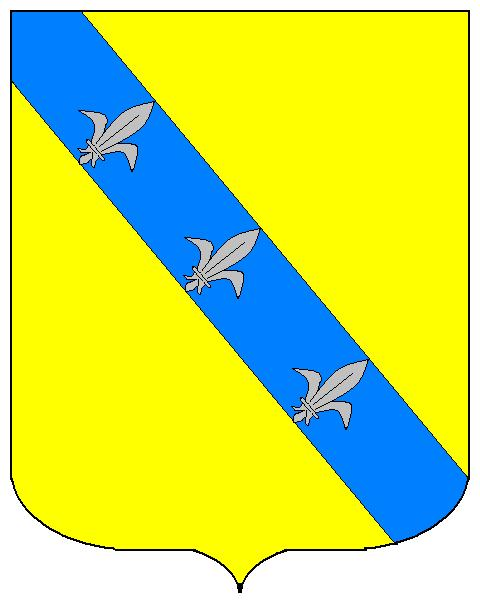 Grb obitelji Civalelli